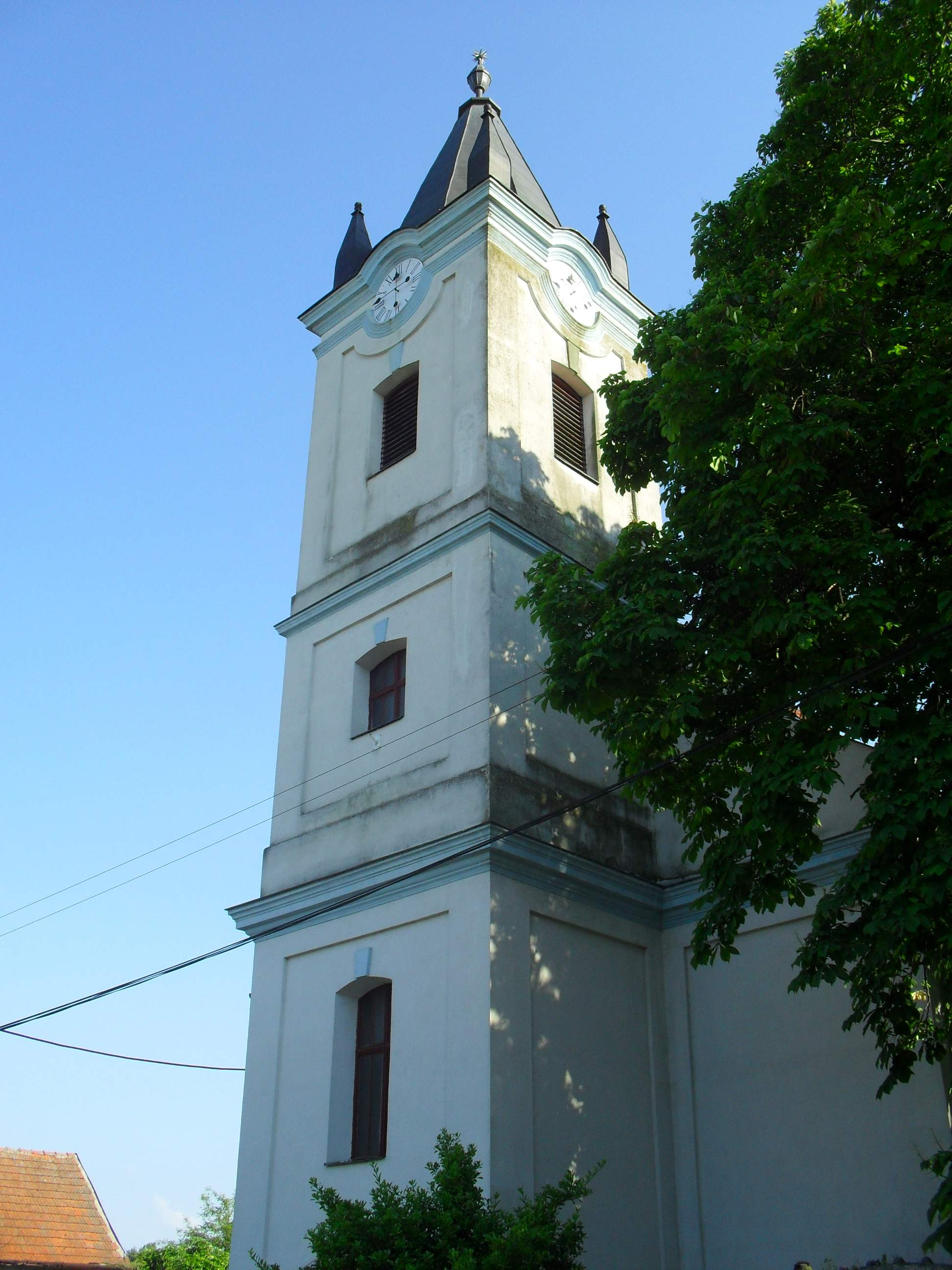 Csallóközaranyos - református templom